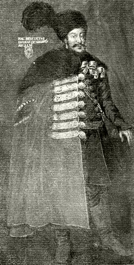 Esterhas (Esterházy) Benedek arcképe, Csernai Károly munkája a Fraknóban található eredeti festmény alapján